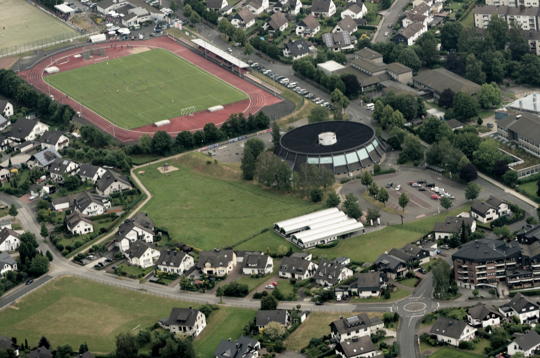 Fotoflug Sauerland Nord. Attendorn, Hansastadion, Blickrichtung Ost The making of this document was supported by the Community-Budget of Wikimedia Germany.